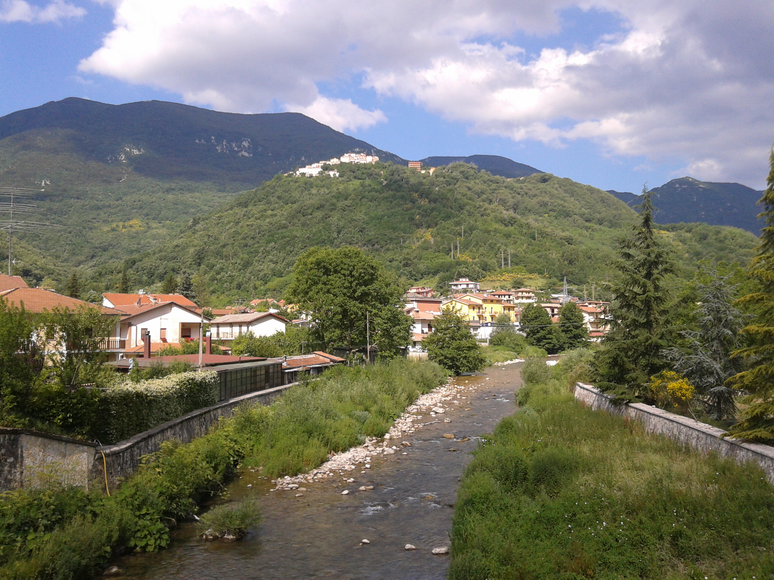 Canistro: foto panoramica dal fiume Liri